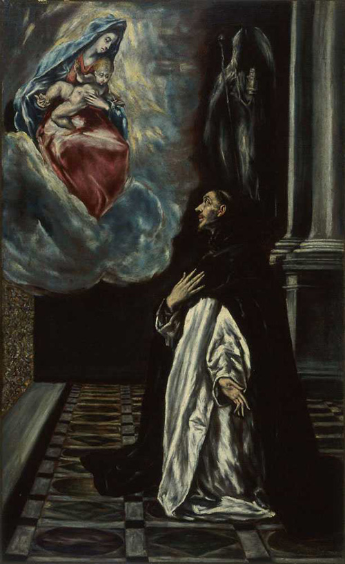 (1606-1614), 99 x 61 cm, Memorial Art Gallery, Nowy Jork